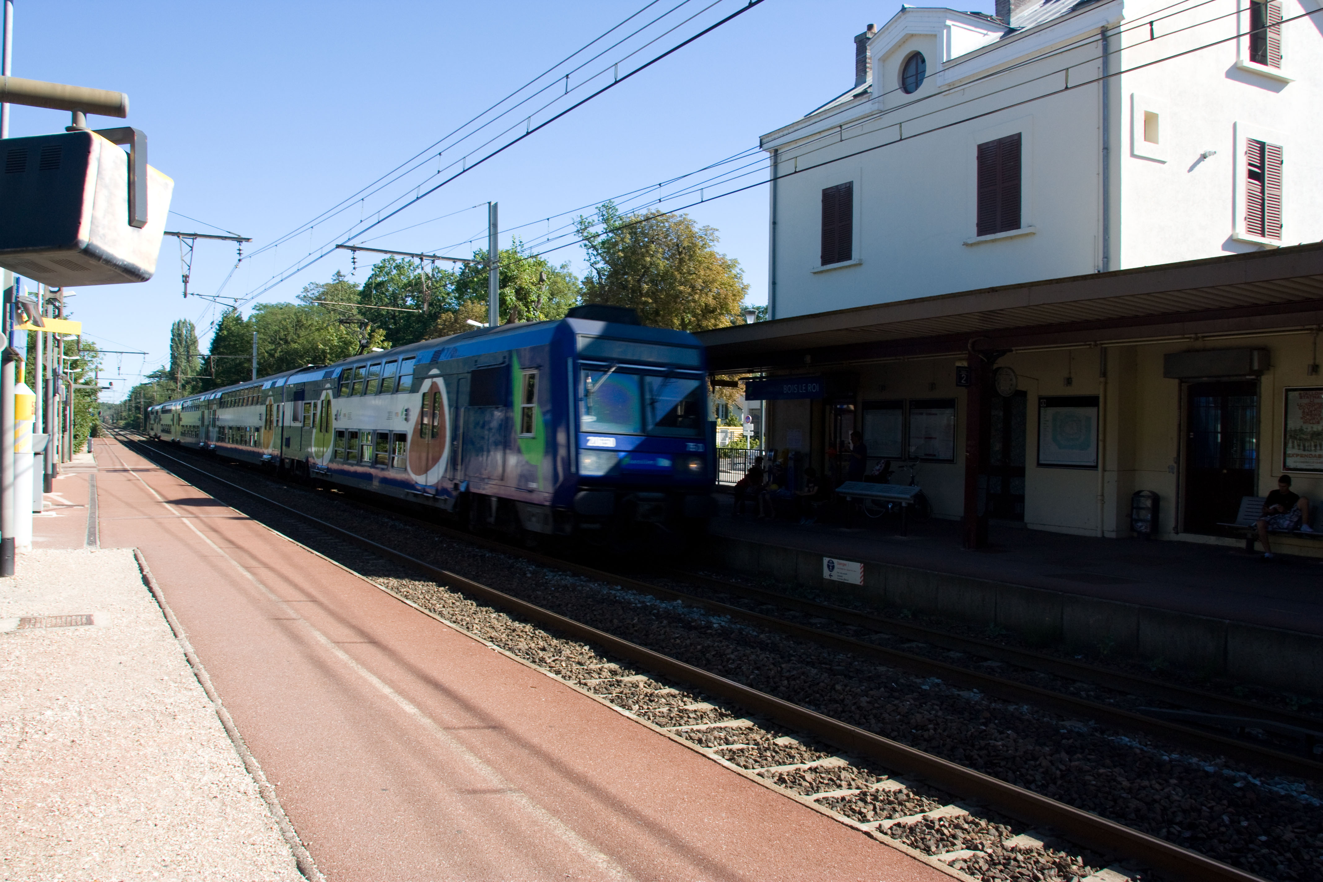 Gare de Bois-le-Roi, Bois-le-Roi, Seine-et-Marne, France